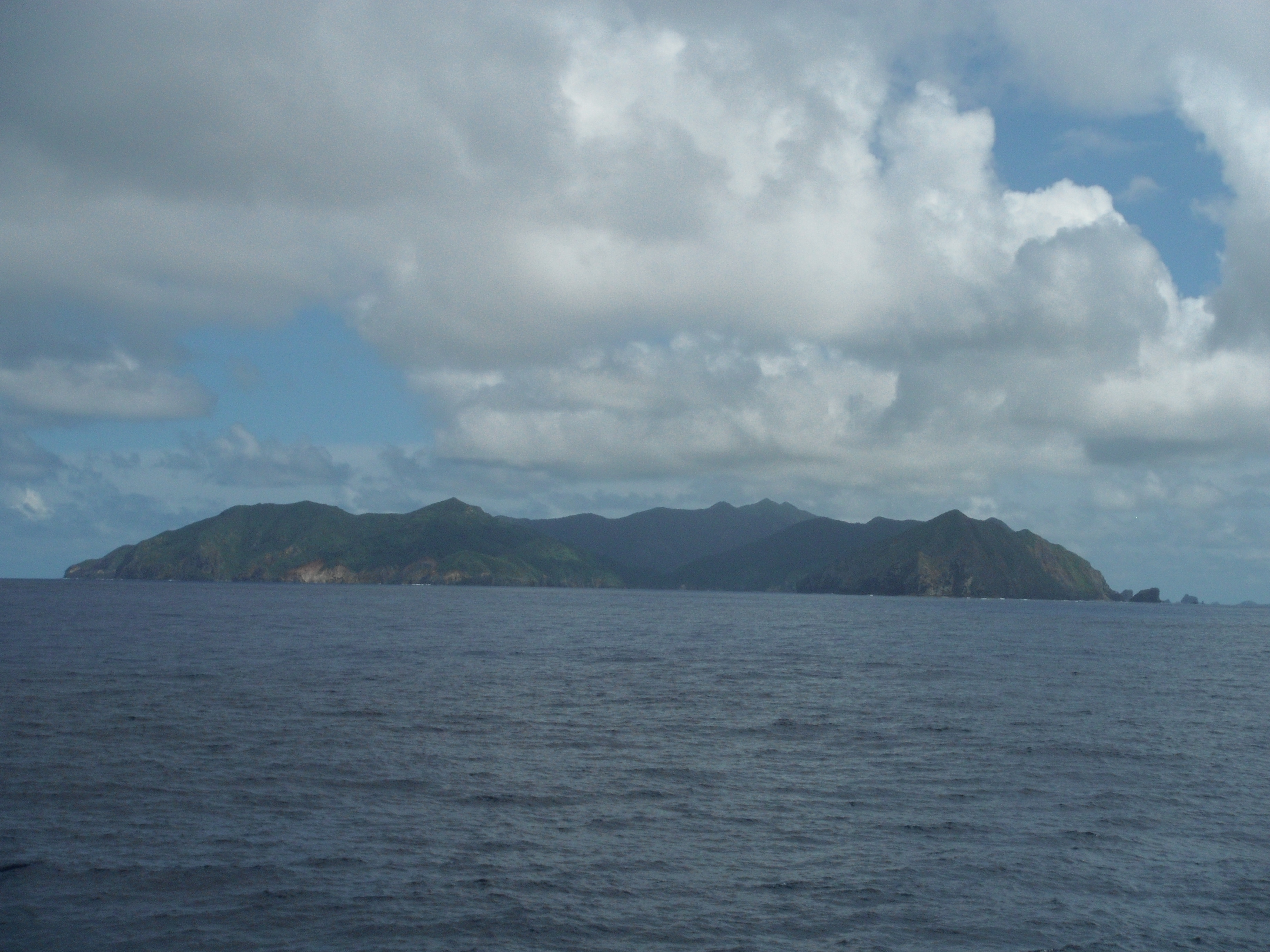 小笠原の母島 ははじま丸より撮影